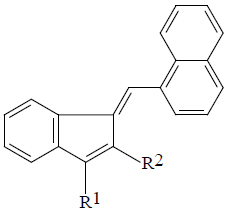 Нафтилметилидены